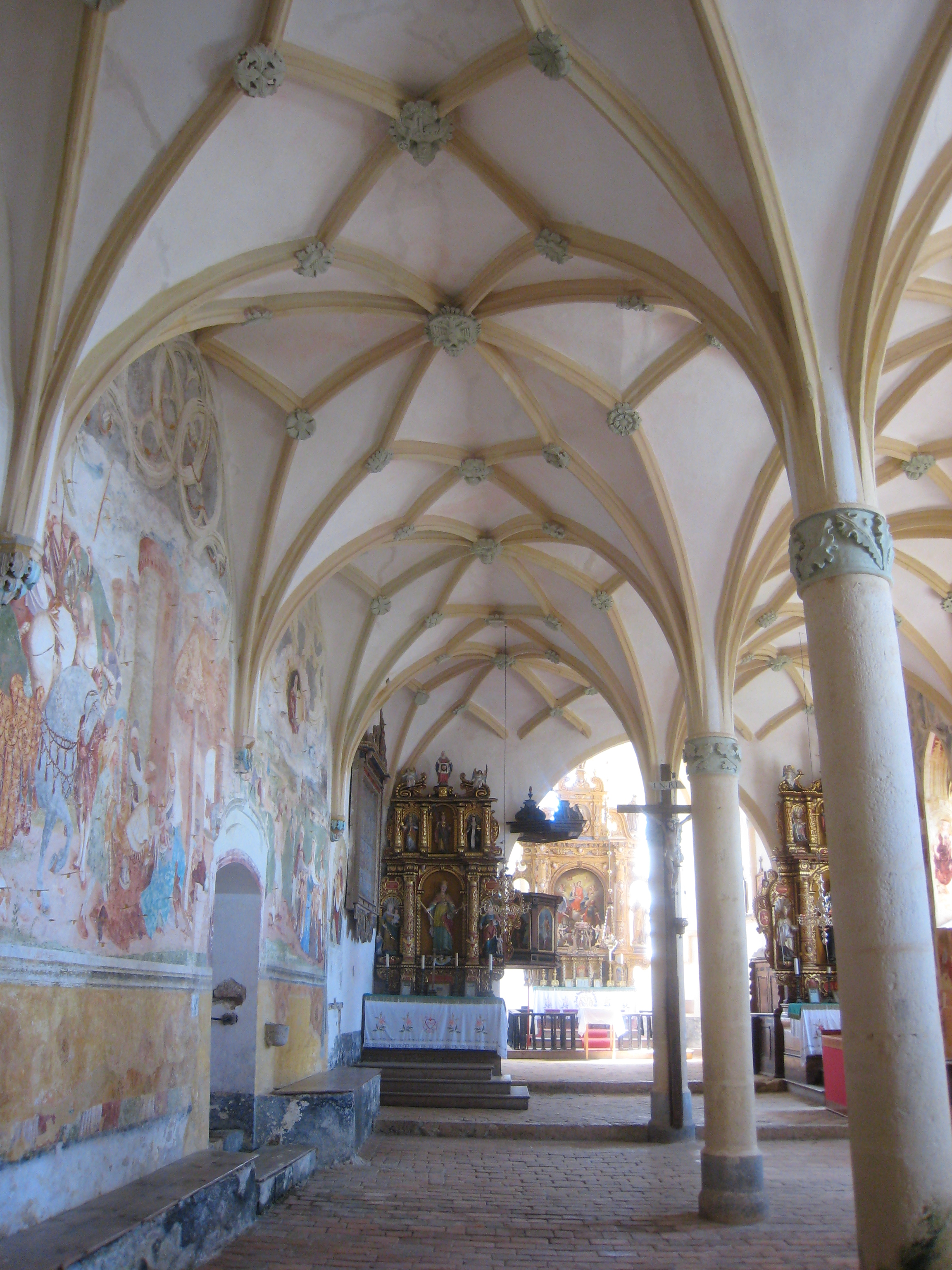 cerkev sv. Primoža in Felicijana nad Kamnikom: severna cerkvena ladja